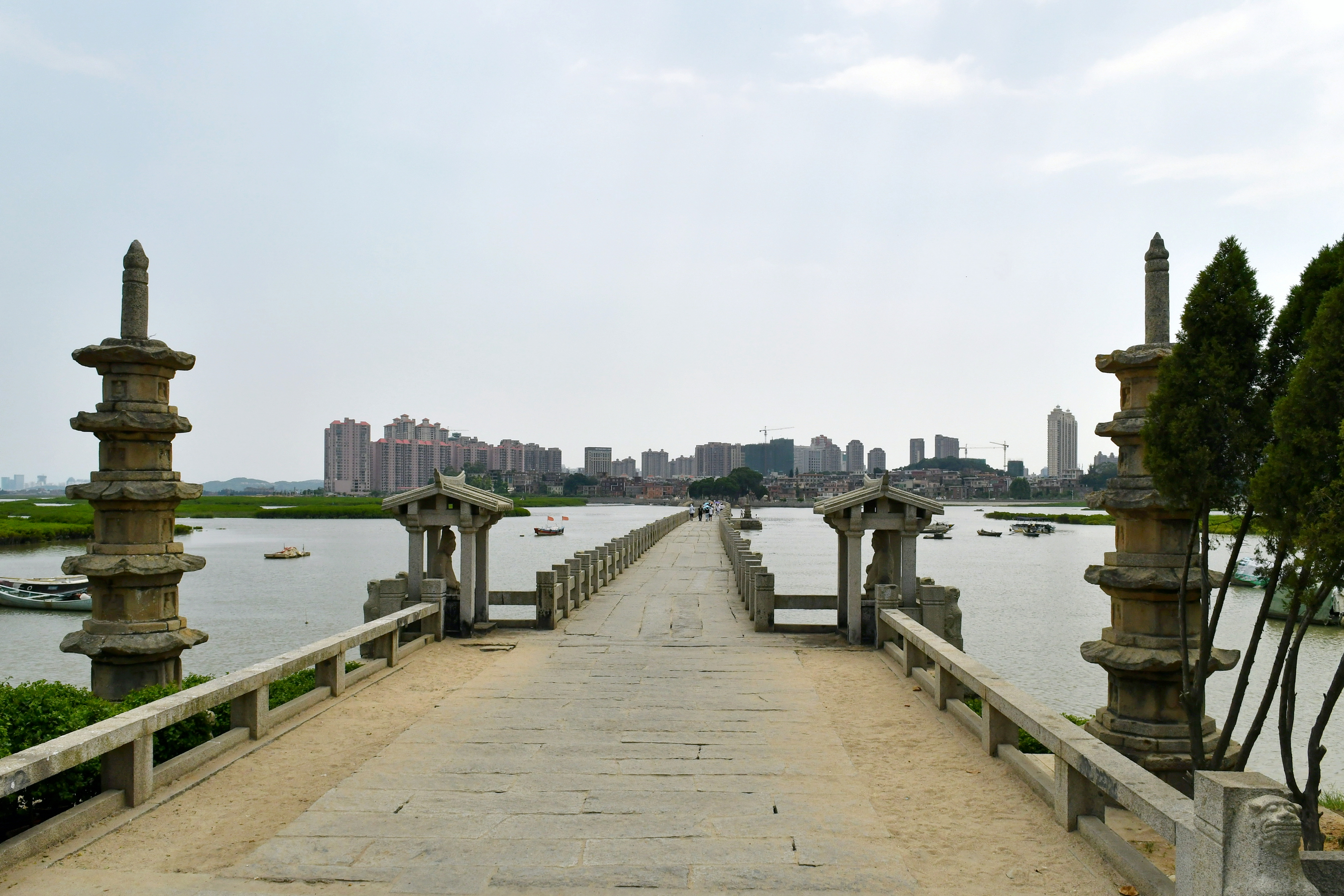 泉州洛阳桥（又名万安桥）北侧，桥北楼阁式双塔。